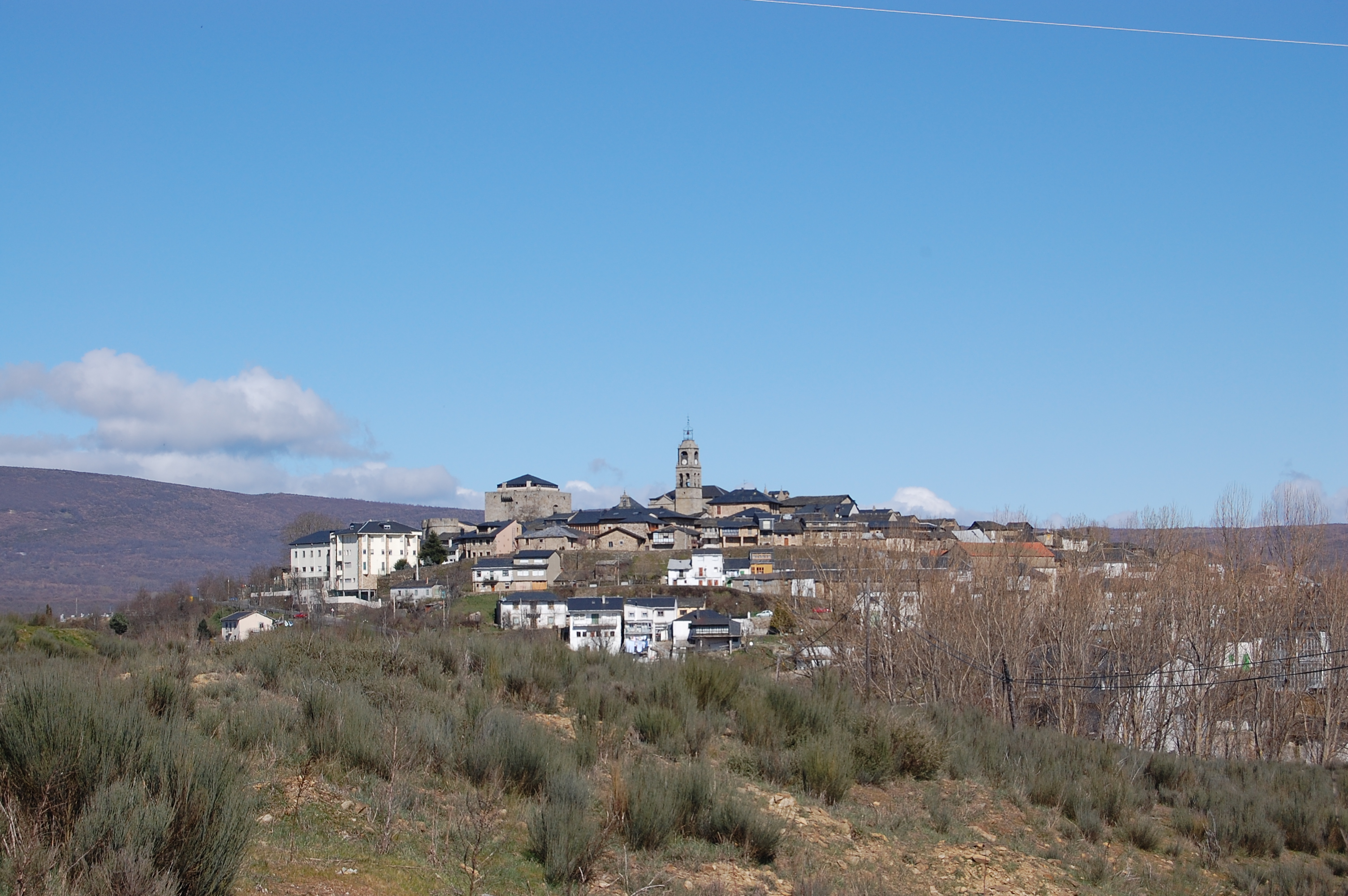 Puebla de Sanabria (Póvoa de Seabra), província de Zamora, Espanha.